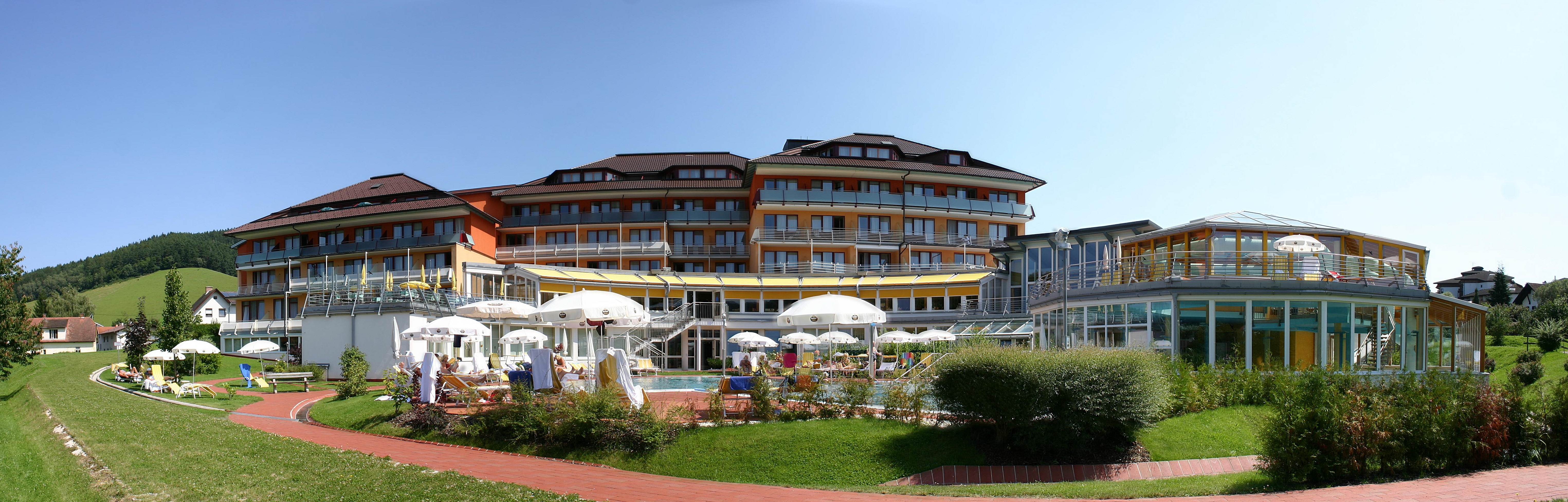 Bad Schönau Panorama Kuranstalt „Landsknechte“